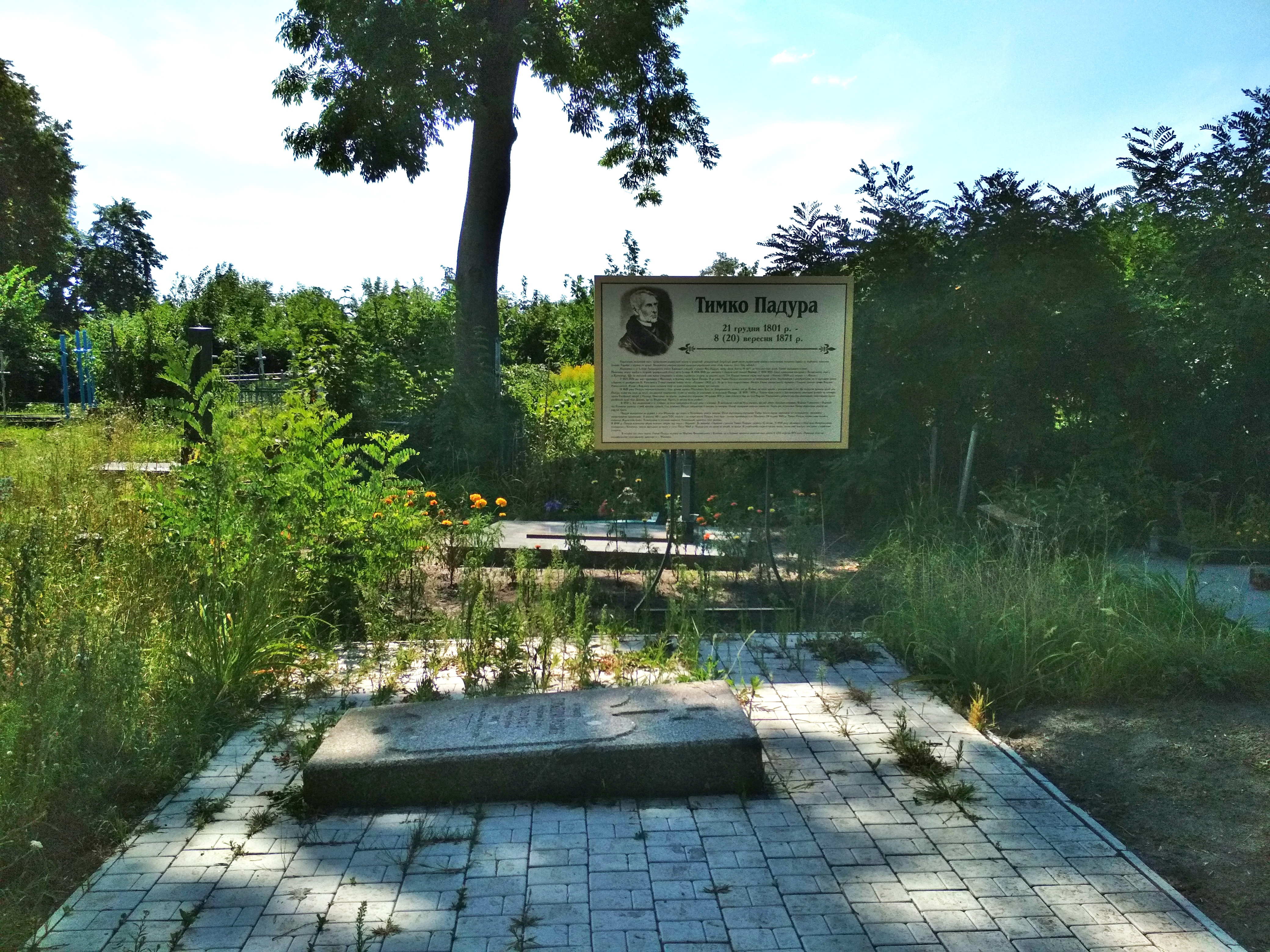 С. Махнівка Козятинсько району, могила Тимка Падури на католицькому цвинтарі